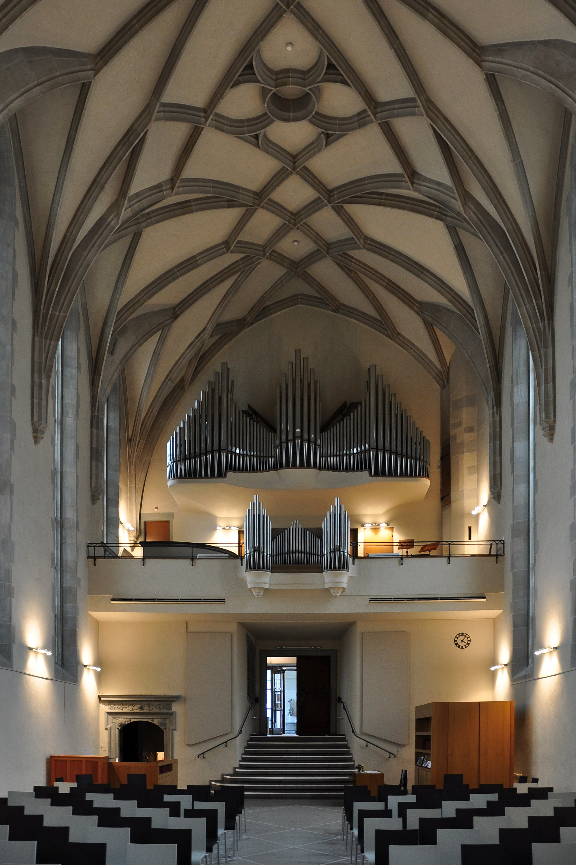 Wasserkirche in Zürich (Switzerland)